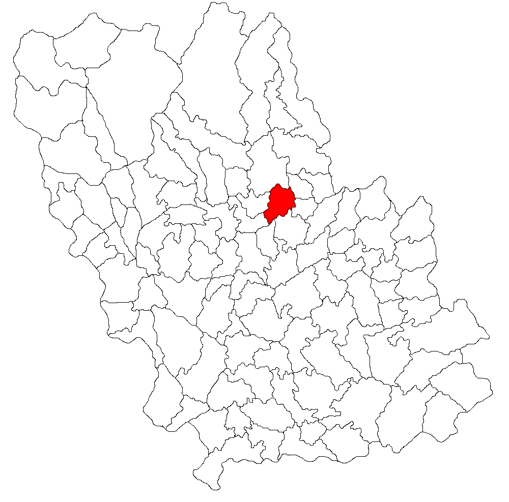 Categorie:Hărţi ale judeţului Prahova